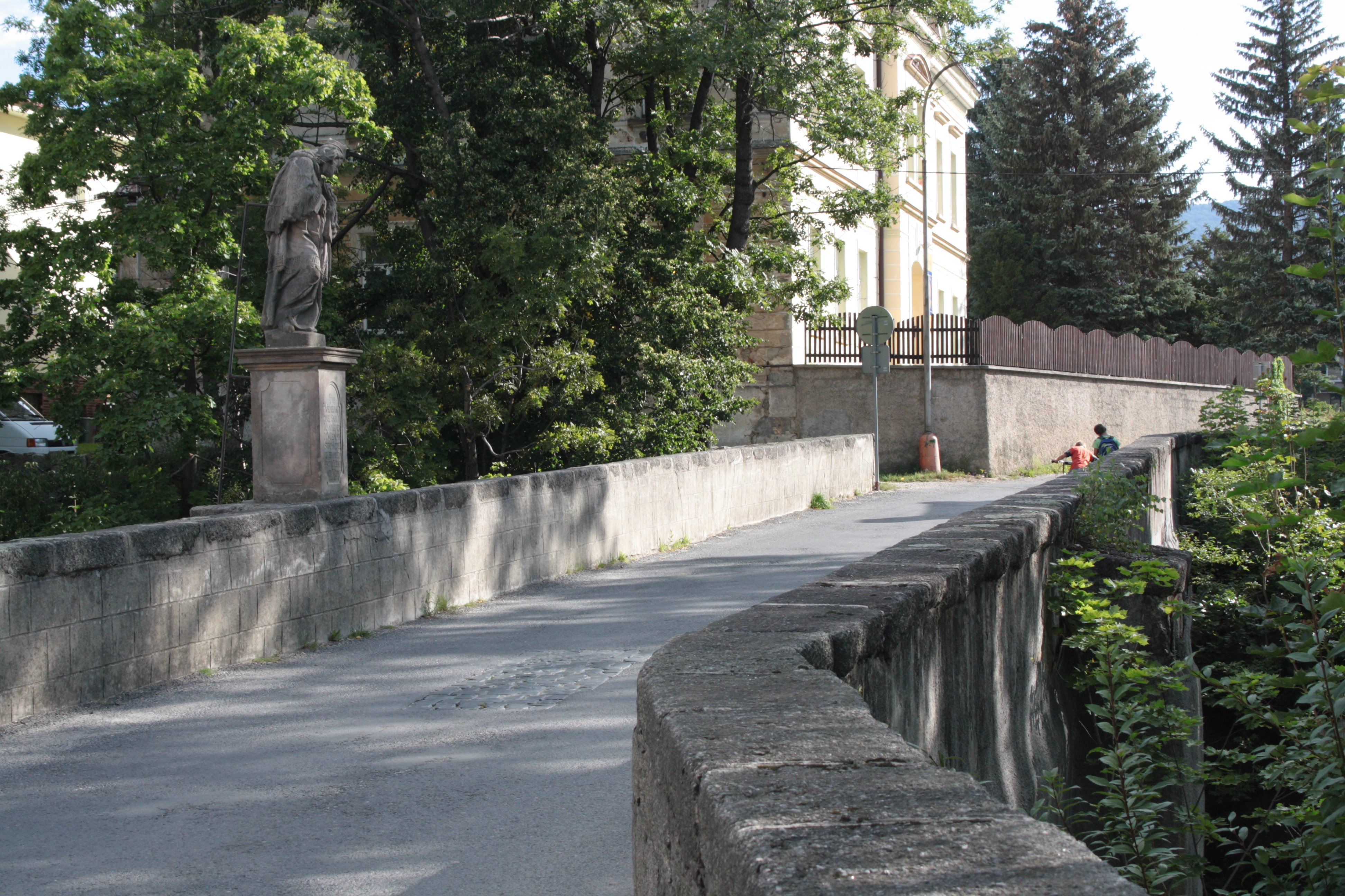 This photograph was taken with a DSLR from WMCZ's Camera grant. Silničních most v Hejnicích (pohled ze západu).